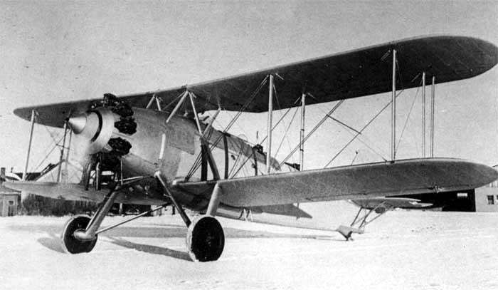 Heinkel 50 Flight Test